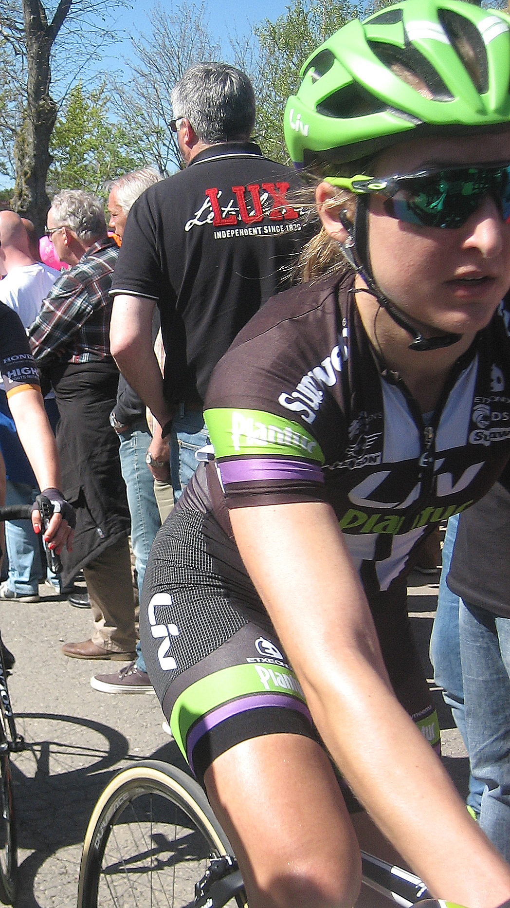 Leah Kirchmann (Liv-Plantur) na finish Waalse Pijl 2016